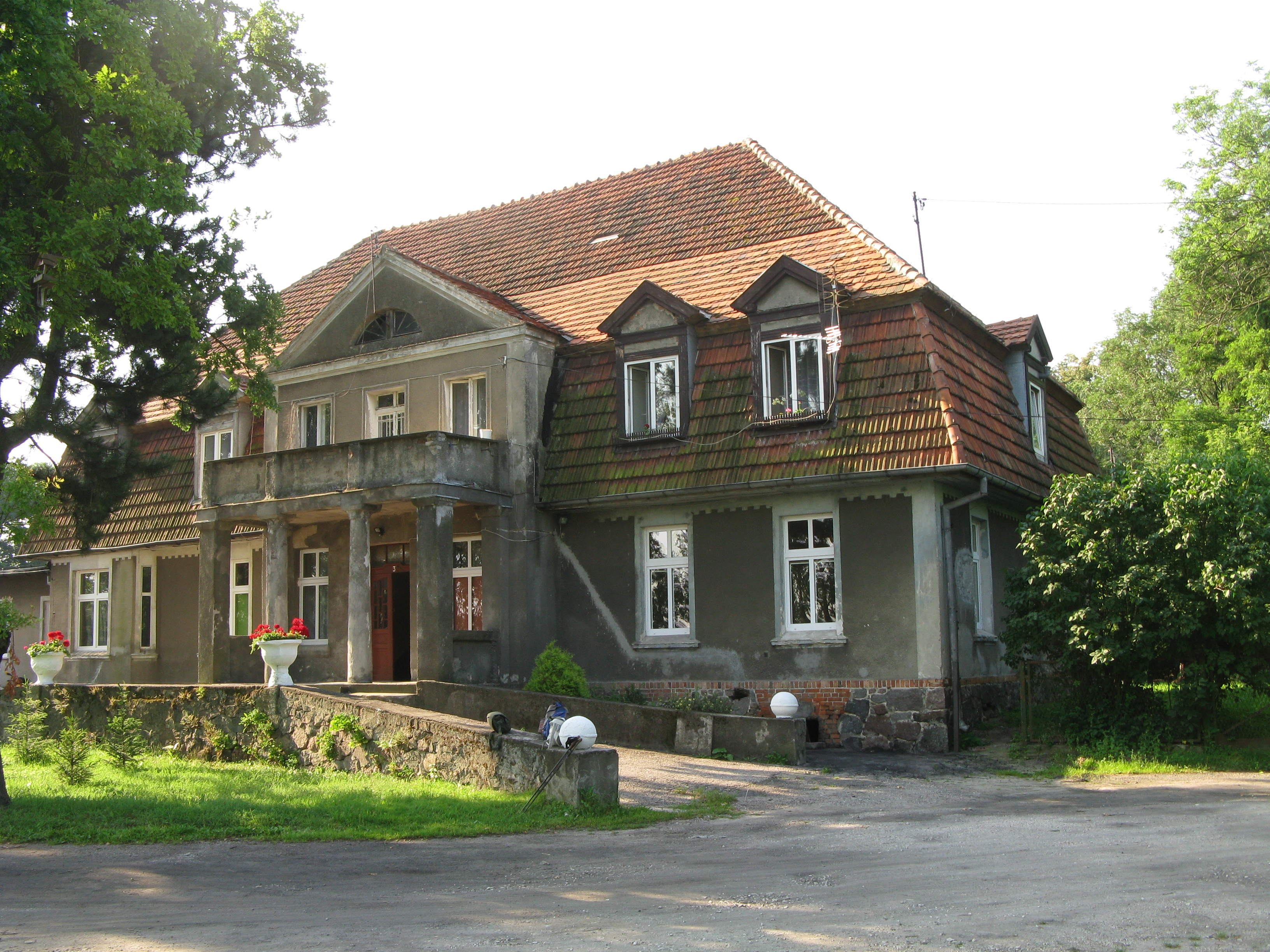 XIX wieczny dwór w Rzęczkowie